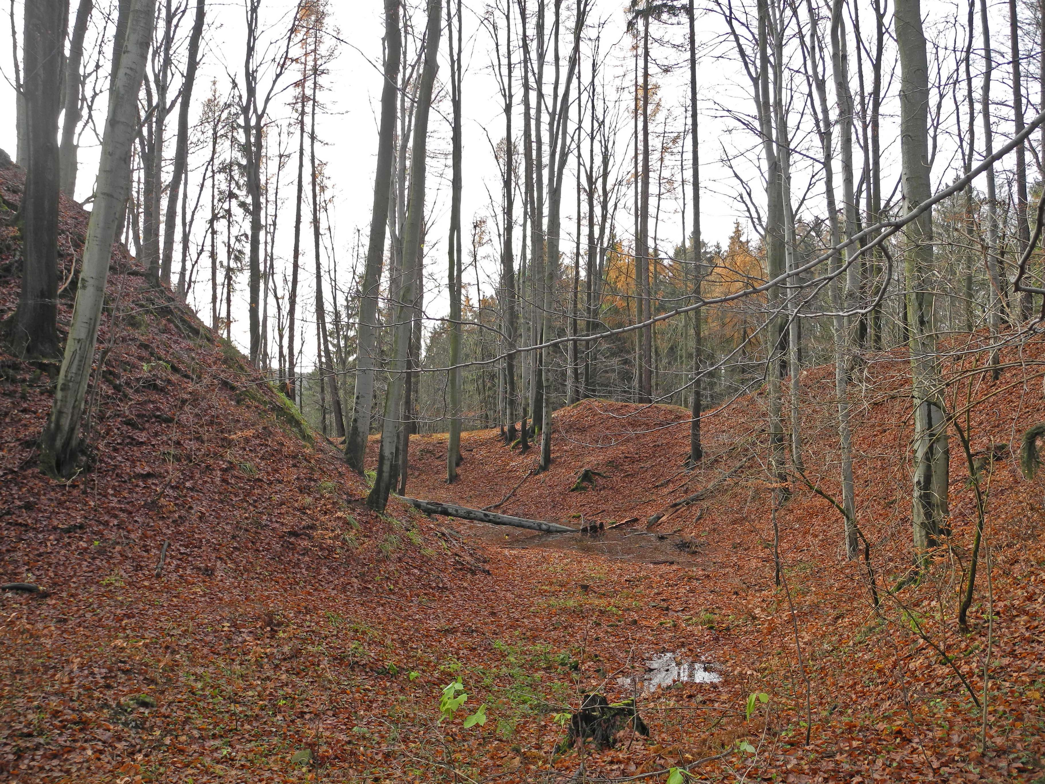 Burg Schönbuch bei Schönbüchel (Krásný Buk)